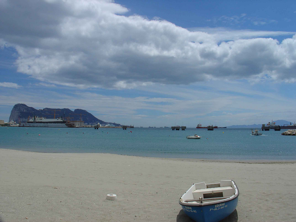 Gibraltarreko ikuspegia Puente Mayorgatik.